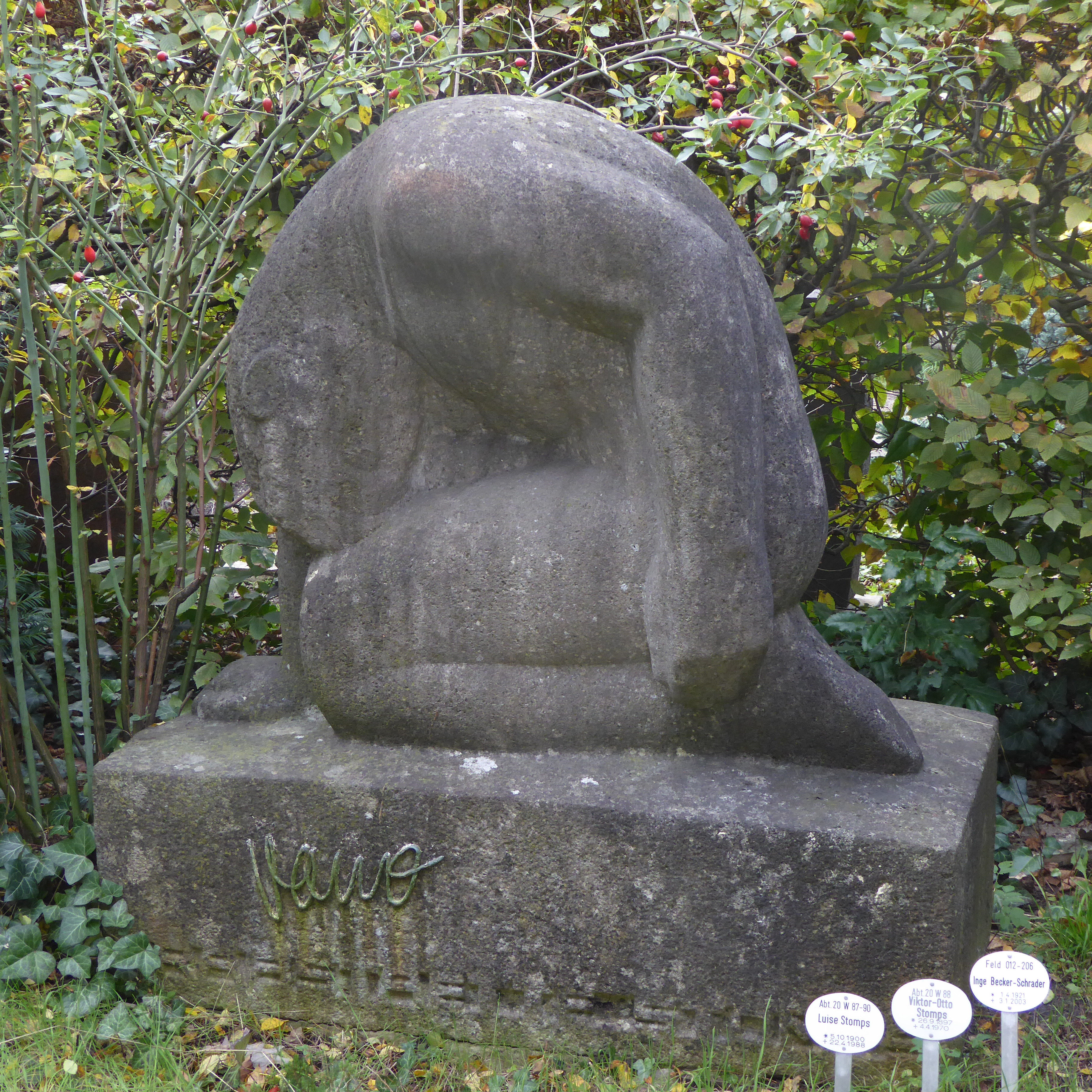 Skulptur Mutter Erde von Louise Stomps auf der Grabstelle Stomps auf dem Friedhof Zehlendorf in Berlin